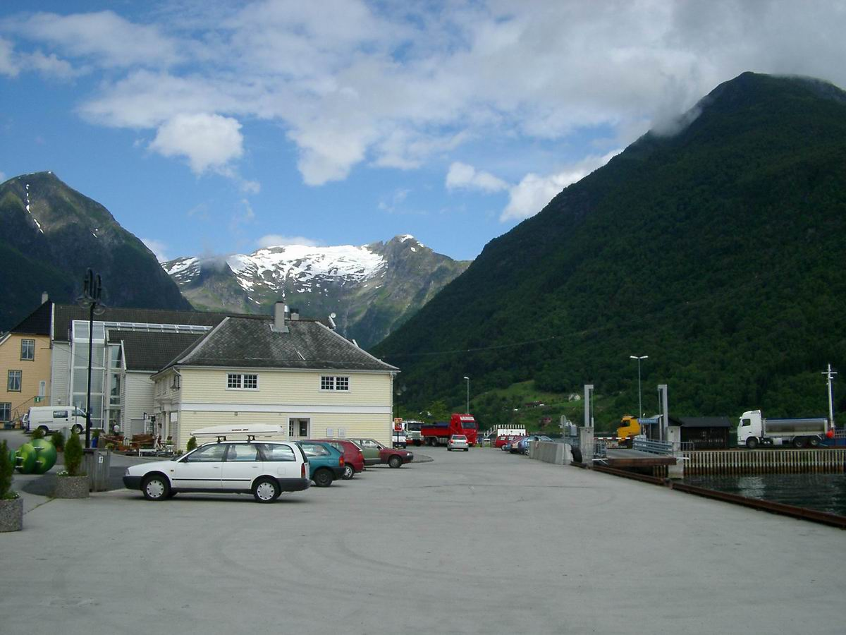 Balestrand Norwegen